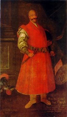 Portrait of Mikołaj Bazyli Potocki (1712-1782)label QS:Len,"Portrait of Mikołaj Bazyli Potocki (1712-1782)" label QS:Luk,"Портрет Миколи Василя Потоцького"